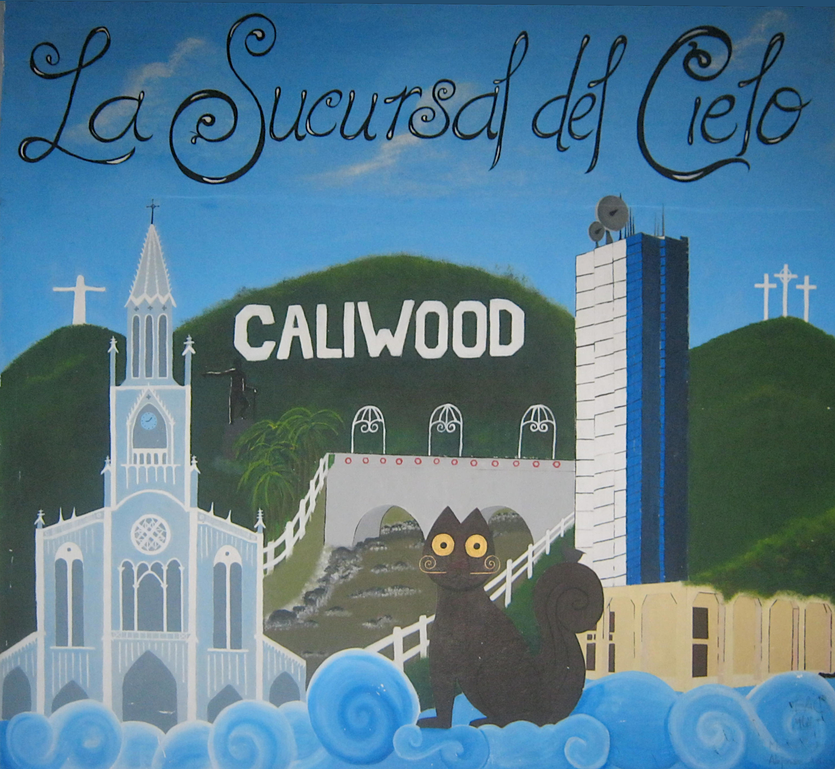 Mural sobre Santiago de Cali, las figuras que aparecen son: La Torre de Cali, la Iglesia la Ermita, el Puente Ortiz, las Tres Cruces, Cristo Rey, el Río Cali y el Gato del Río.